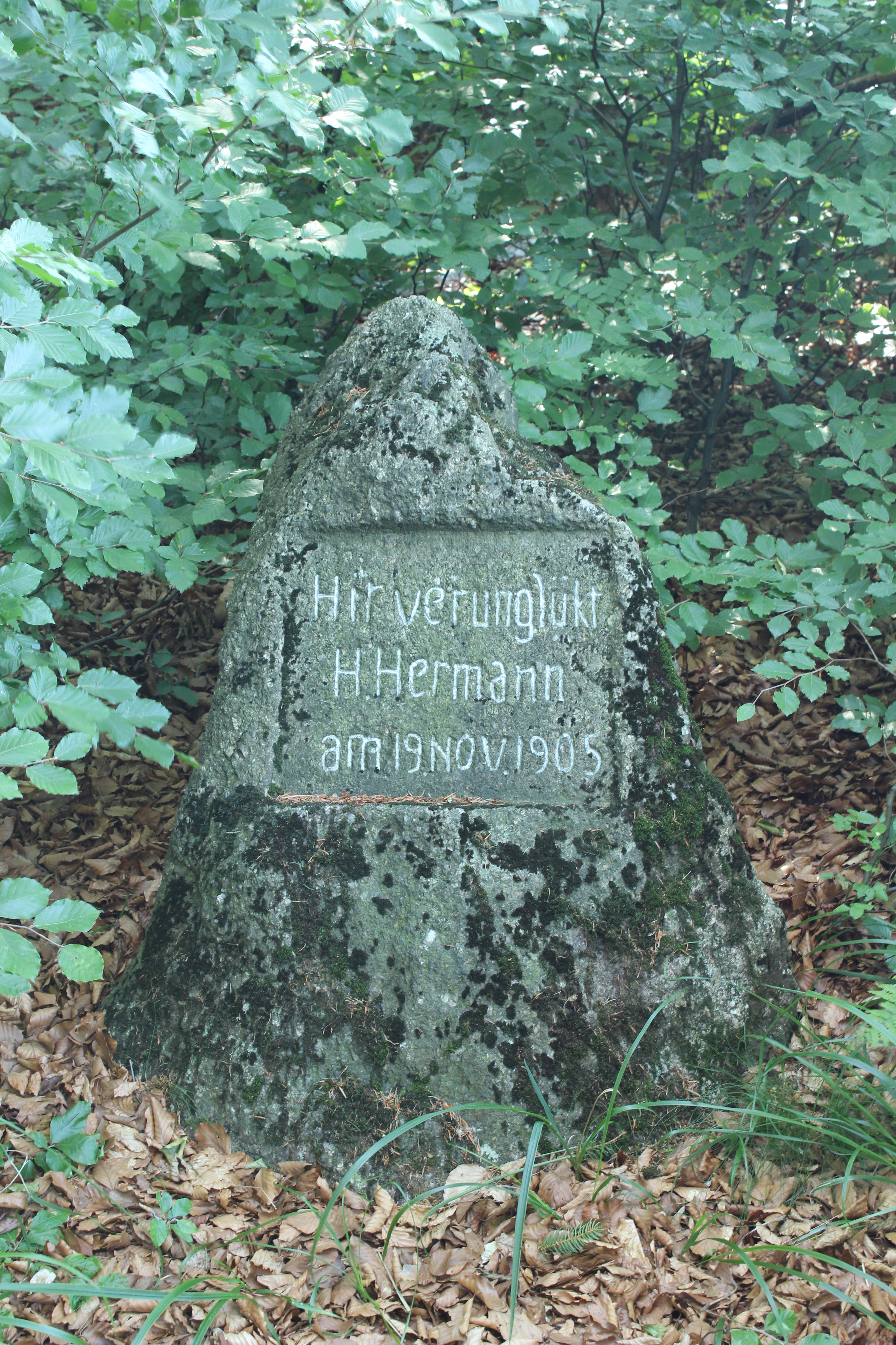 Pomníček Hermannovy smrti.